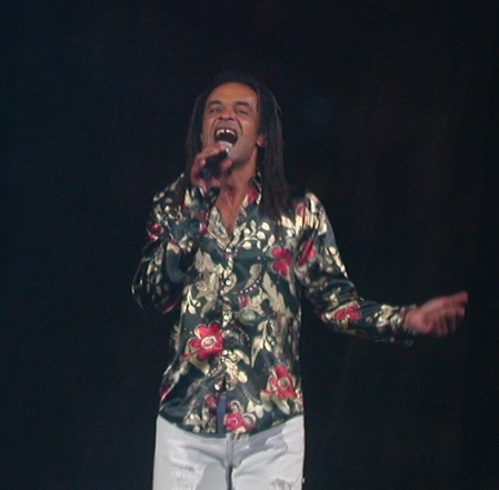 Yannick Noah en concert à Bercy en octobre 2004.